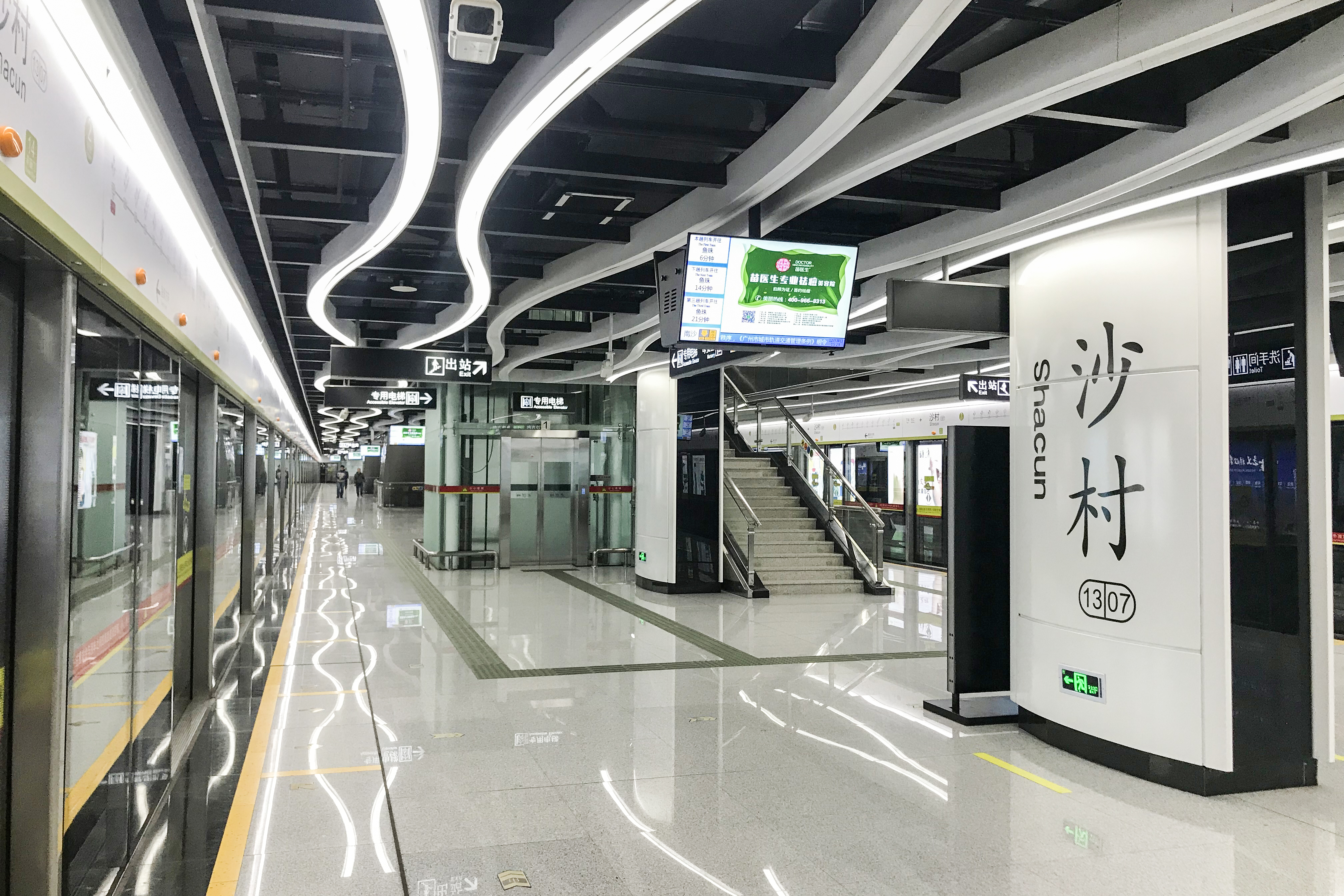 广州地铁沙村站